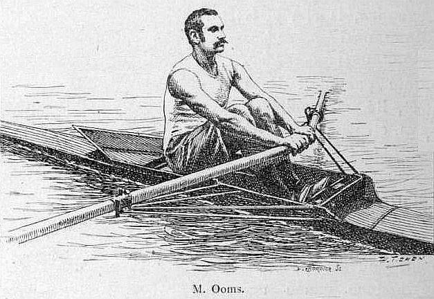 Janus Ooms, Néederlands (vers 1891). In 1891, Ooms won the French Rowing championship (skiff), created in 1876 (first stranger). One year later, in 1892, Ooms became the first competitor from outside the United Kingdom to win the Diamond Challenge Sculls, at Henley